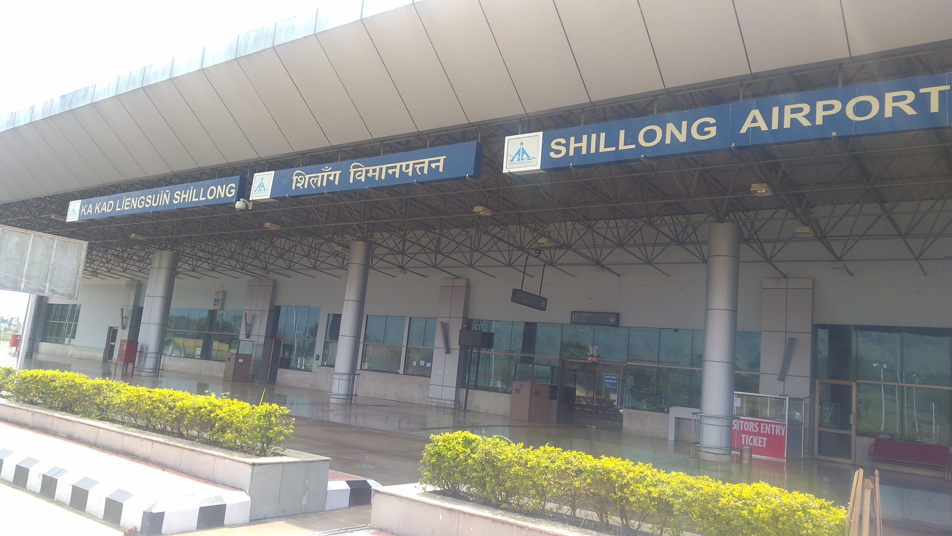 Shillong Airport terminal building, Barapani, Umroi, Shillong, Meghalaya